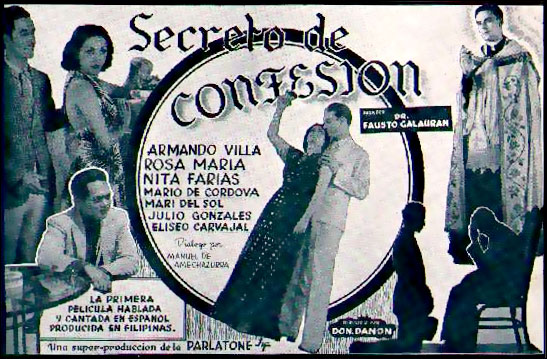 Secreto de Confesión es el título de la primera película del cine filipino en español, que se presentó en su día como "la primera película hablada y cantada en español producida en Filipinas"